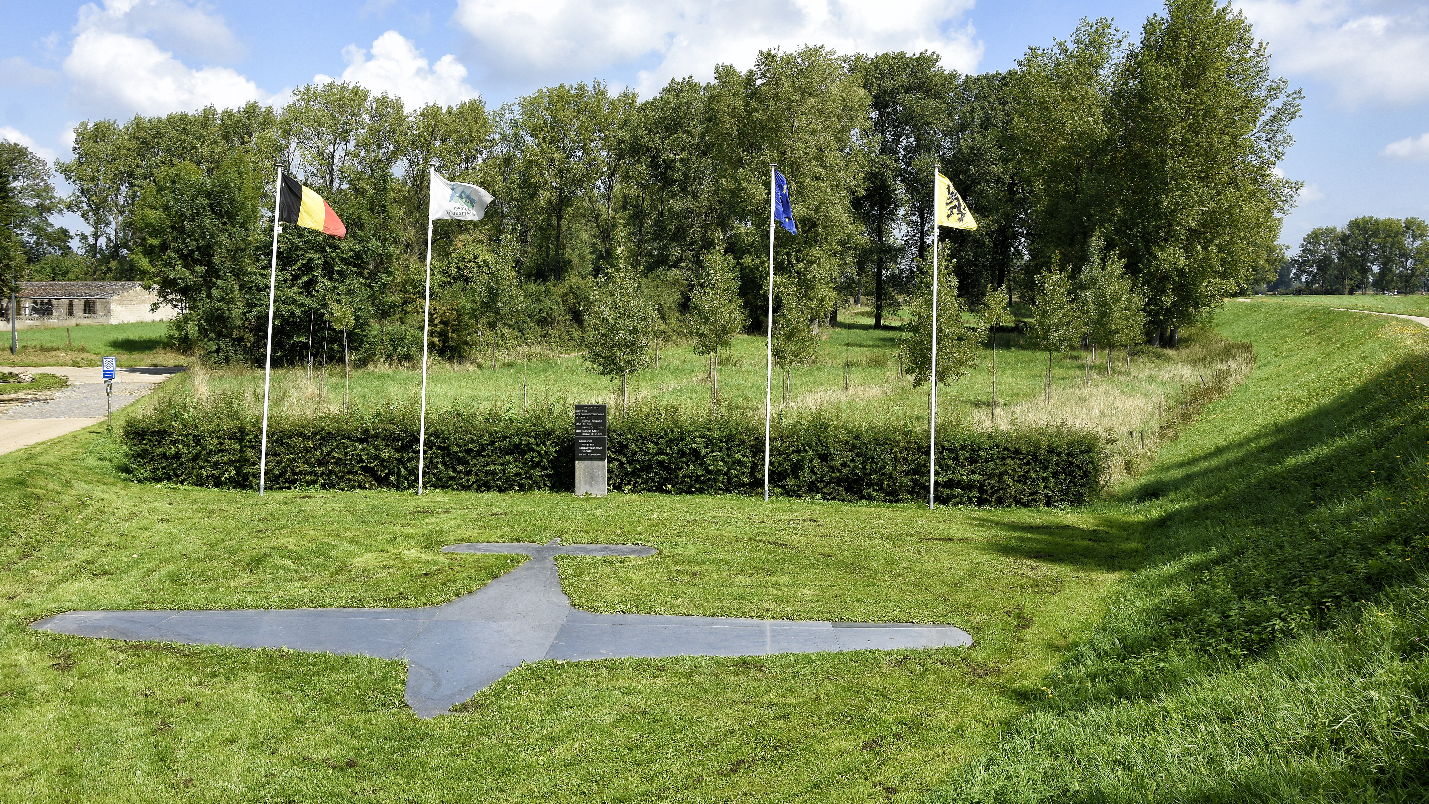 Monument Messerschmitt Bf 108 te Vucht, België